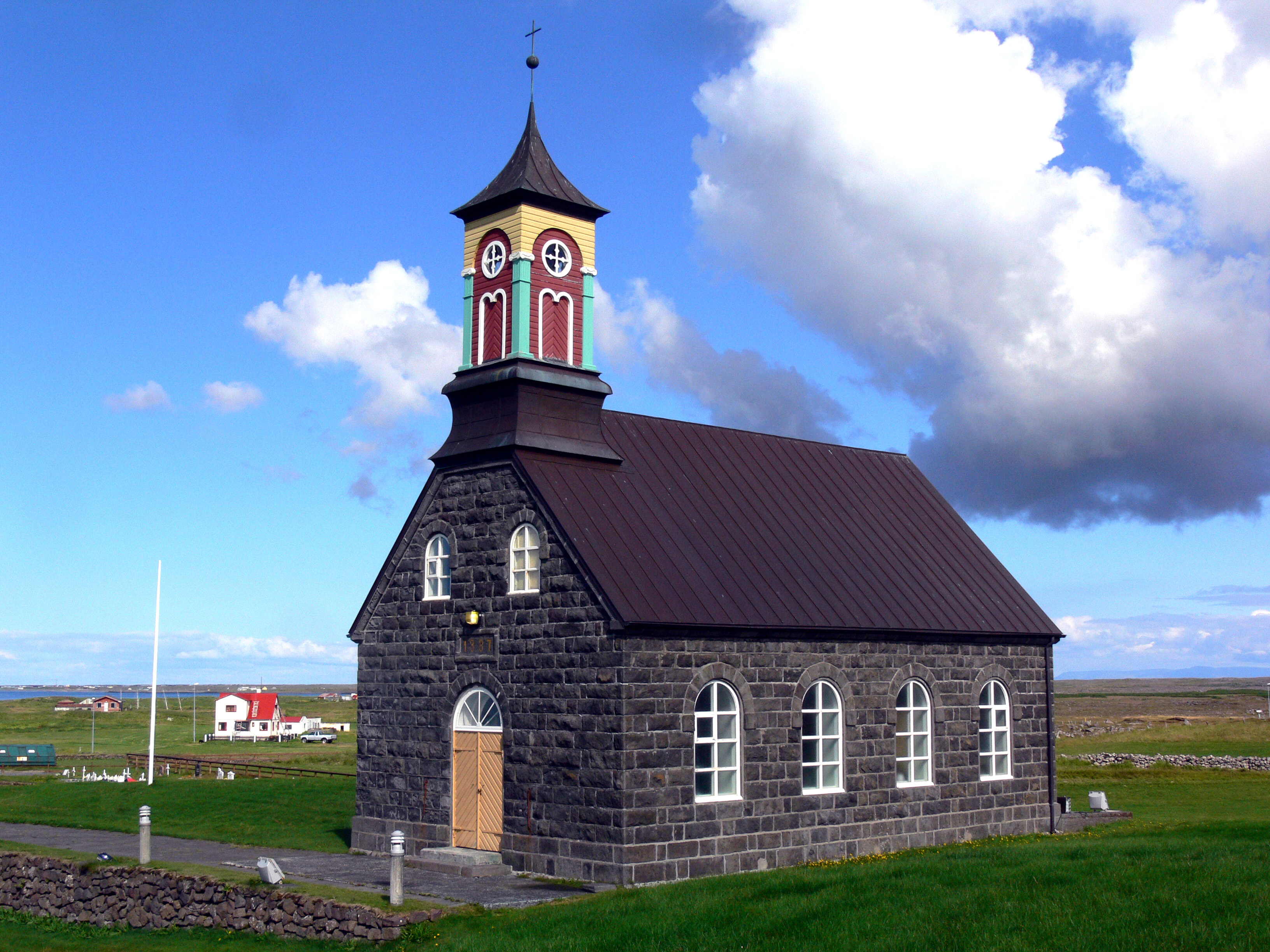 Kirche in Hvalsnes auf Reykjanes in Südisland